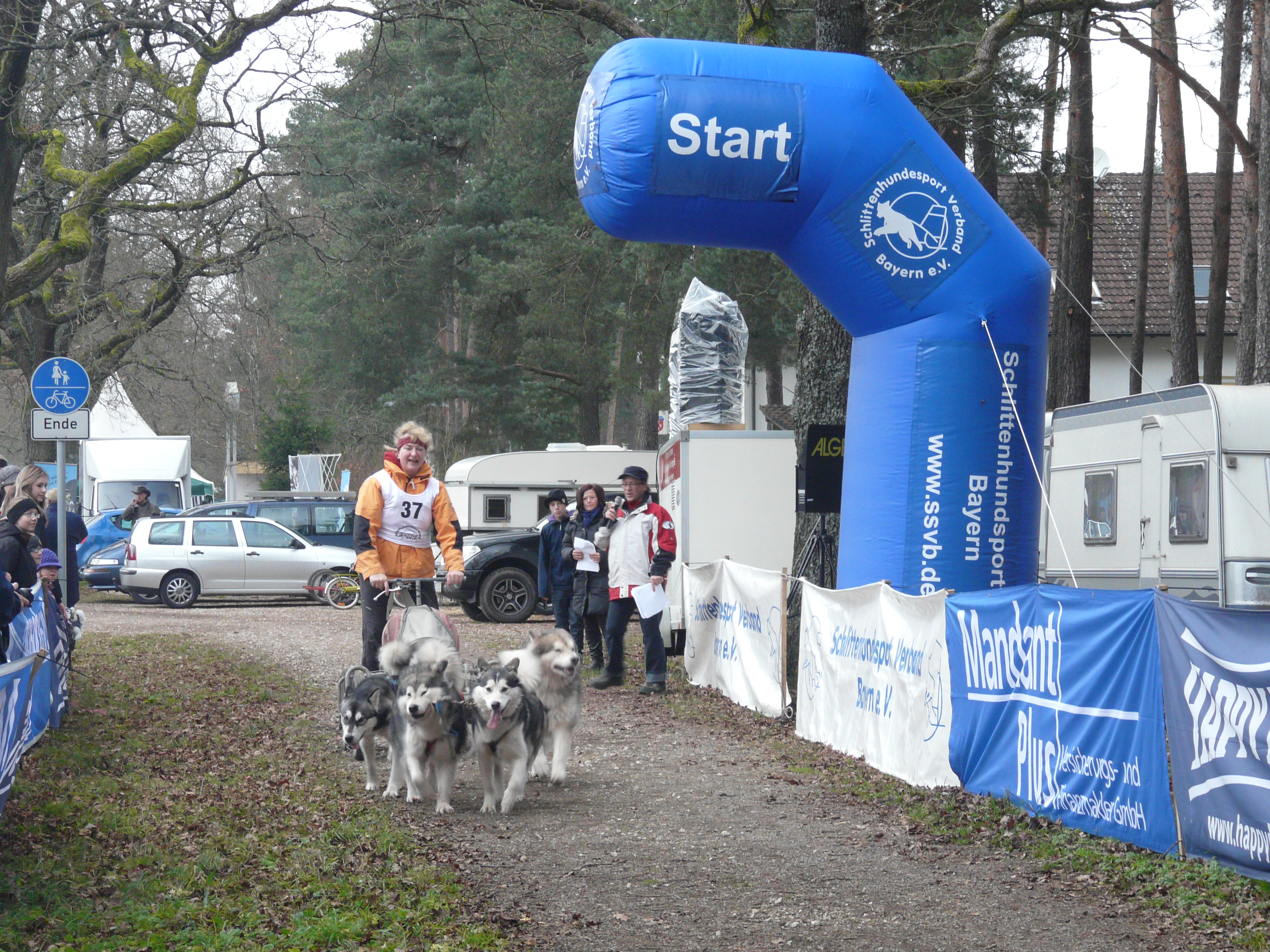 Das 2010er Schlittenhundewagenrennen Frankonia Open, veranstaltet im Laufer Ortsteil Schönberg.